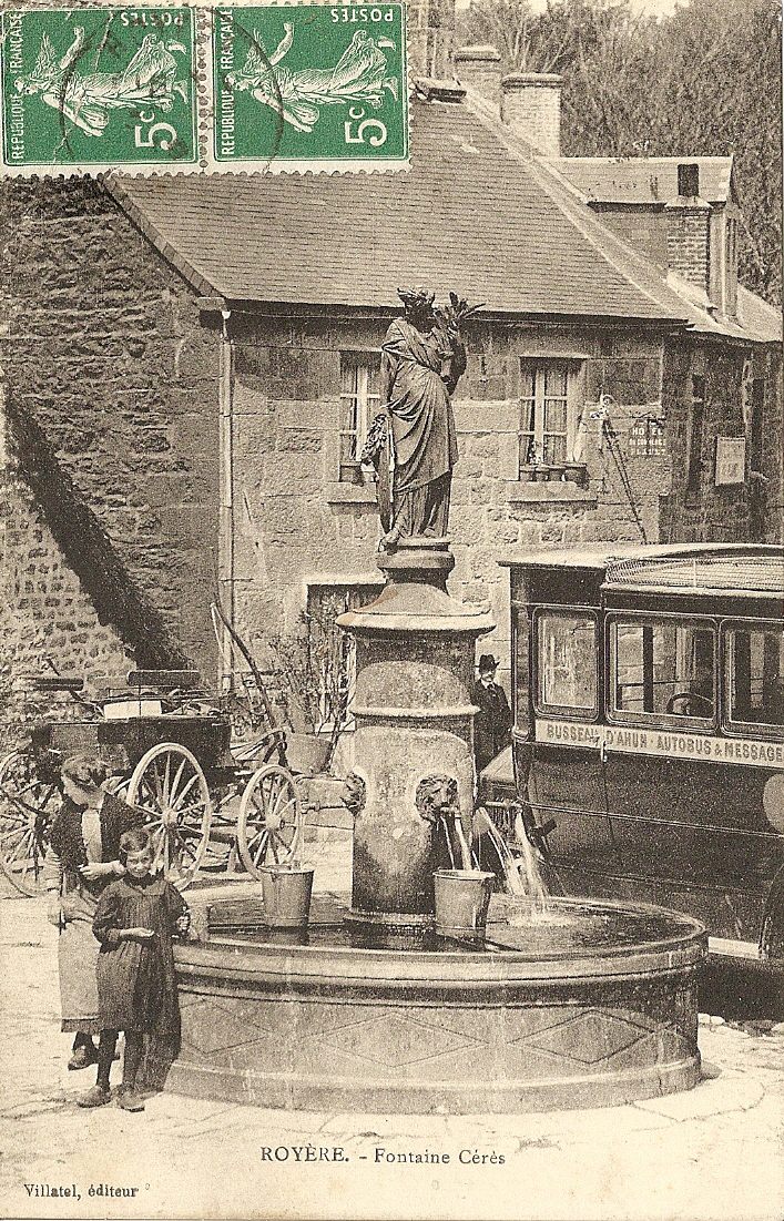 Fontaine, place de la Mayade à Royère-de-Vassivière (Creuse)